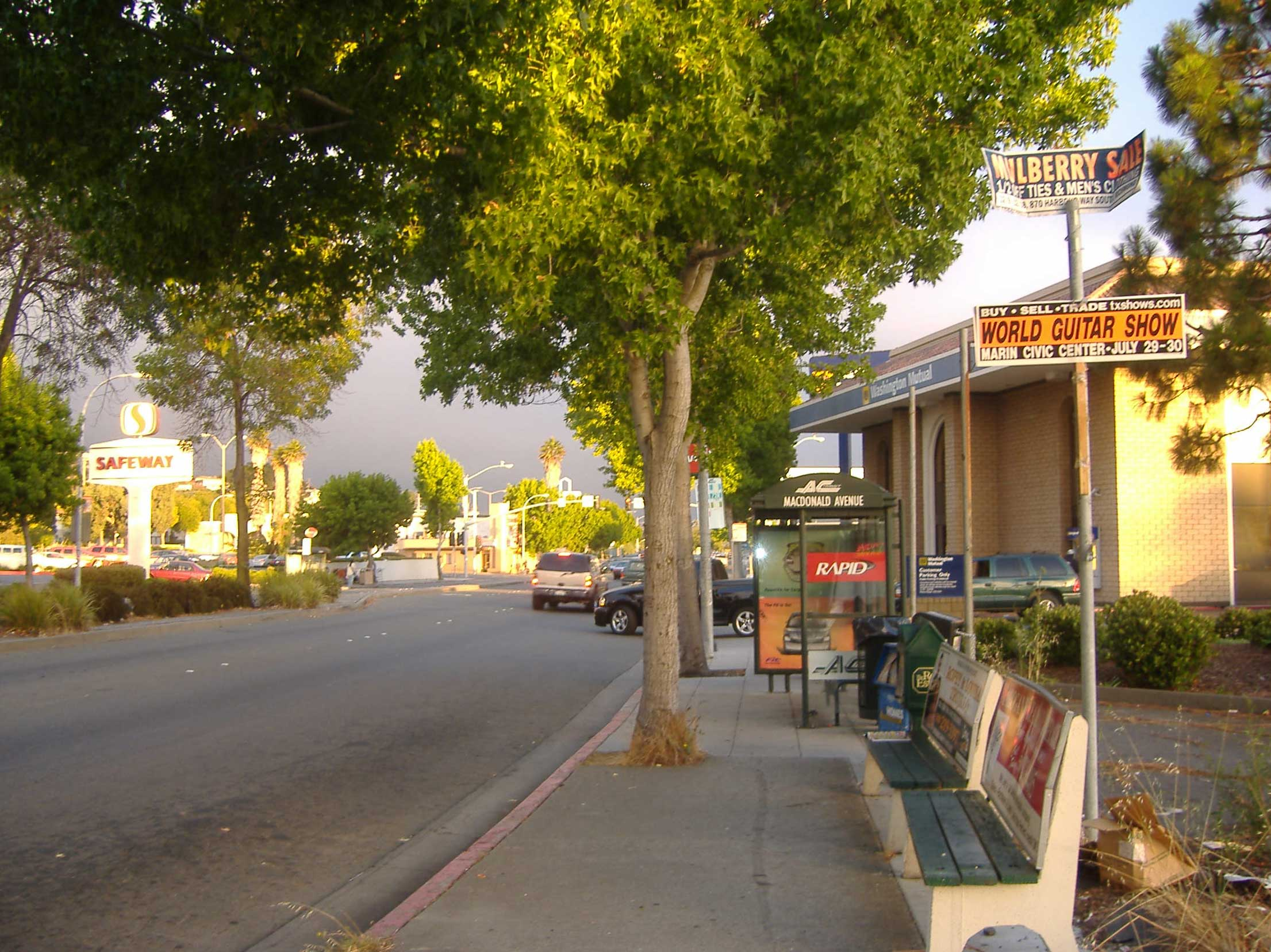 Yo tomé la foto, y la regalo a wikipedia y todos con «copyleft»